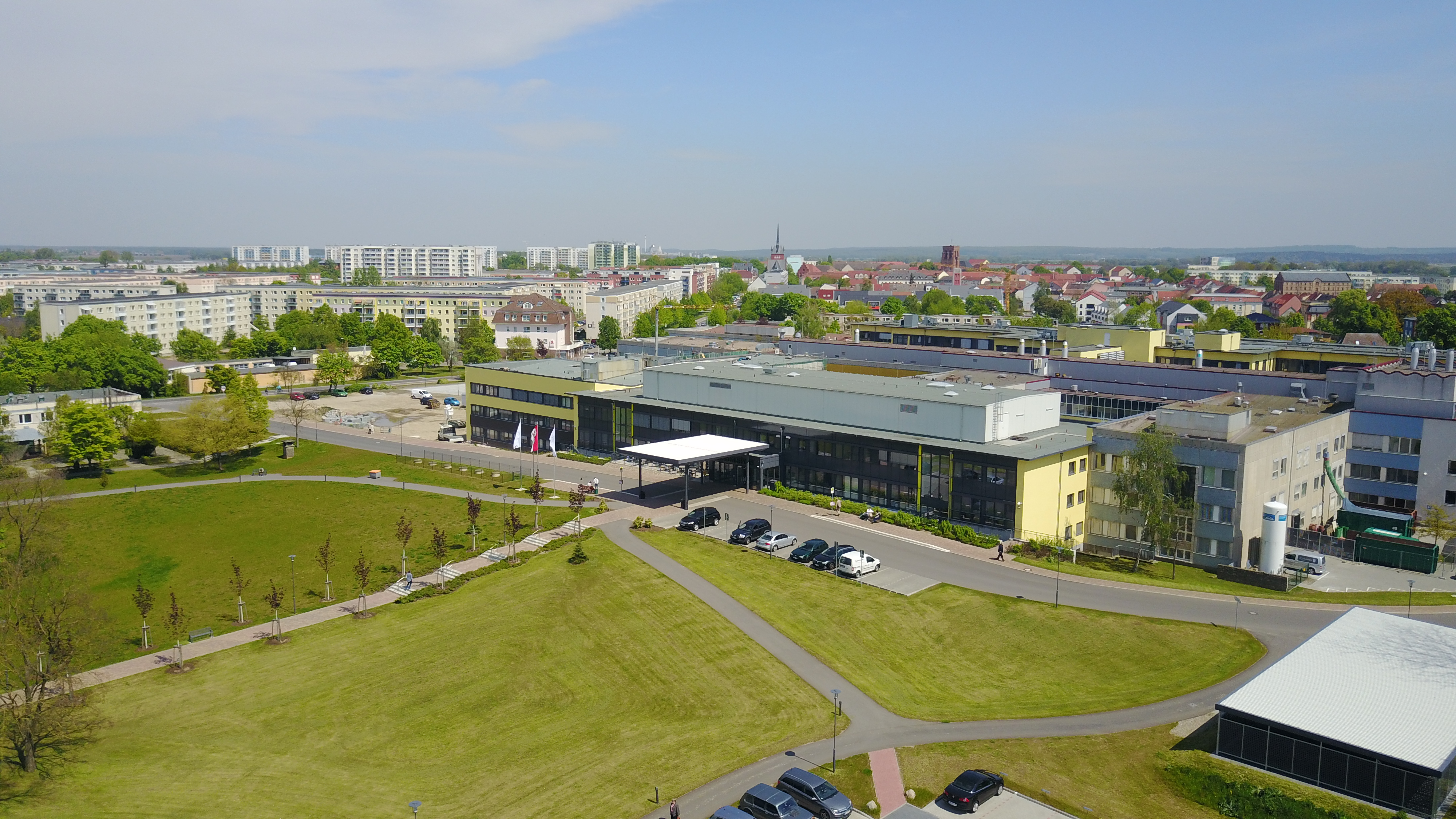 Asklepios Klinikum Uckermark, Schwedt/Oder, Luftaufnahme, Klinikkomplex von West-Süd-West